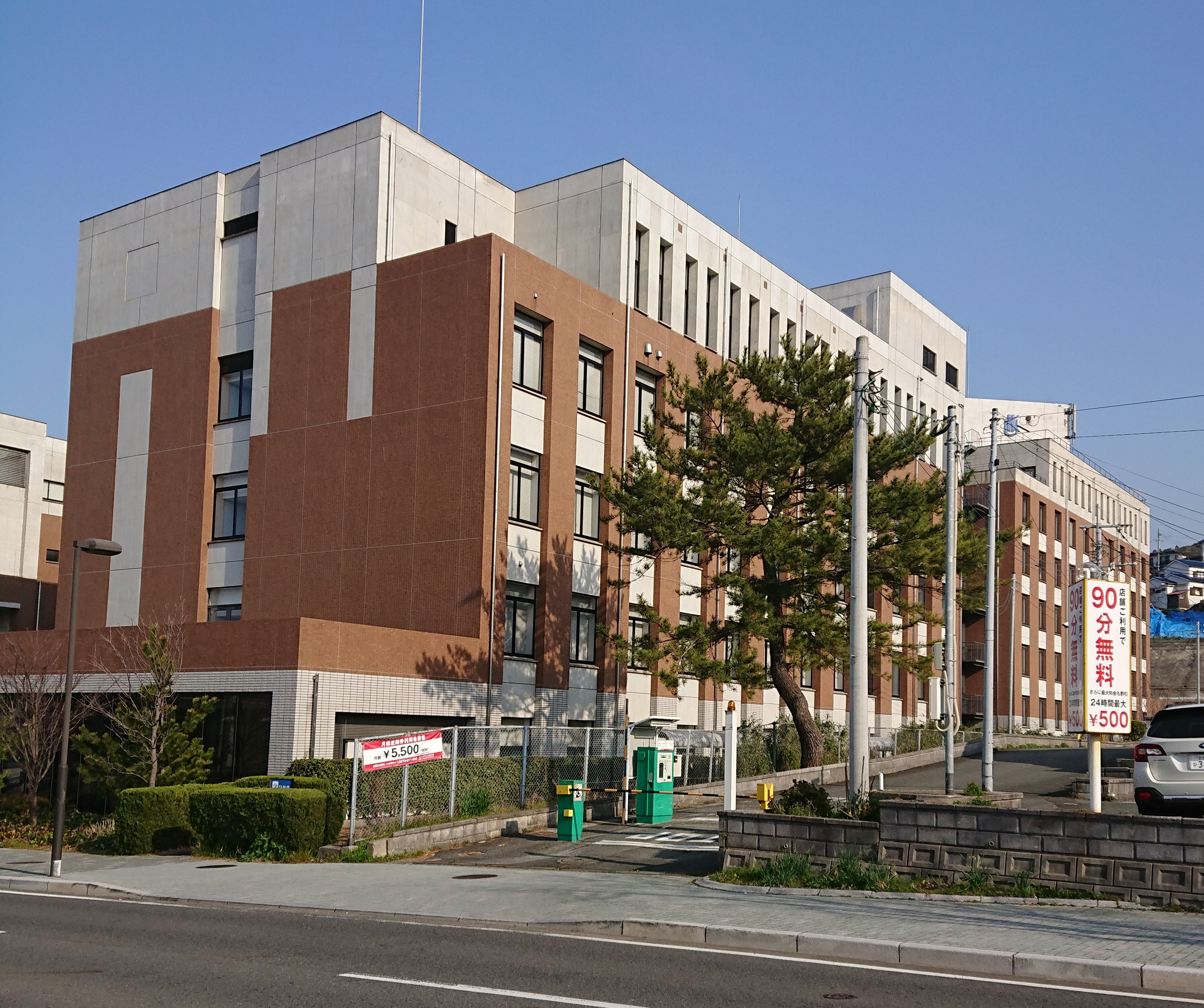 九州国際大学3号館2019年2月26日撮影